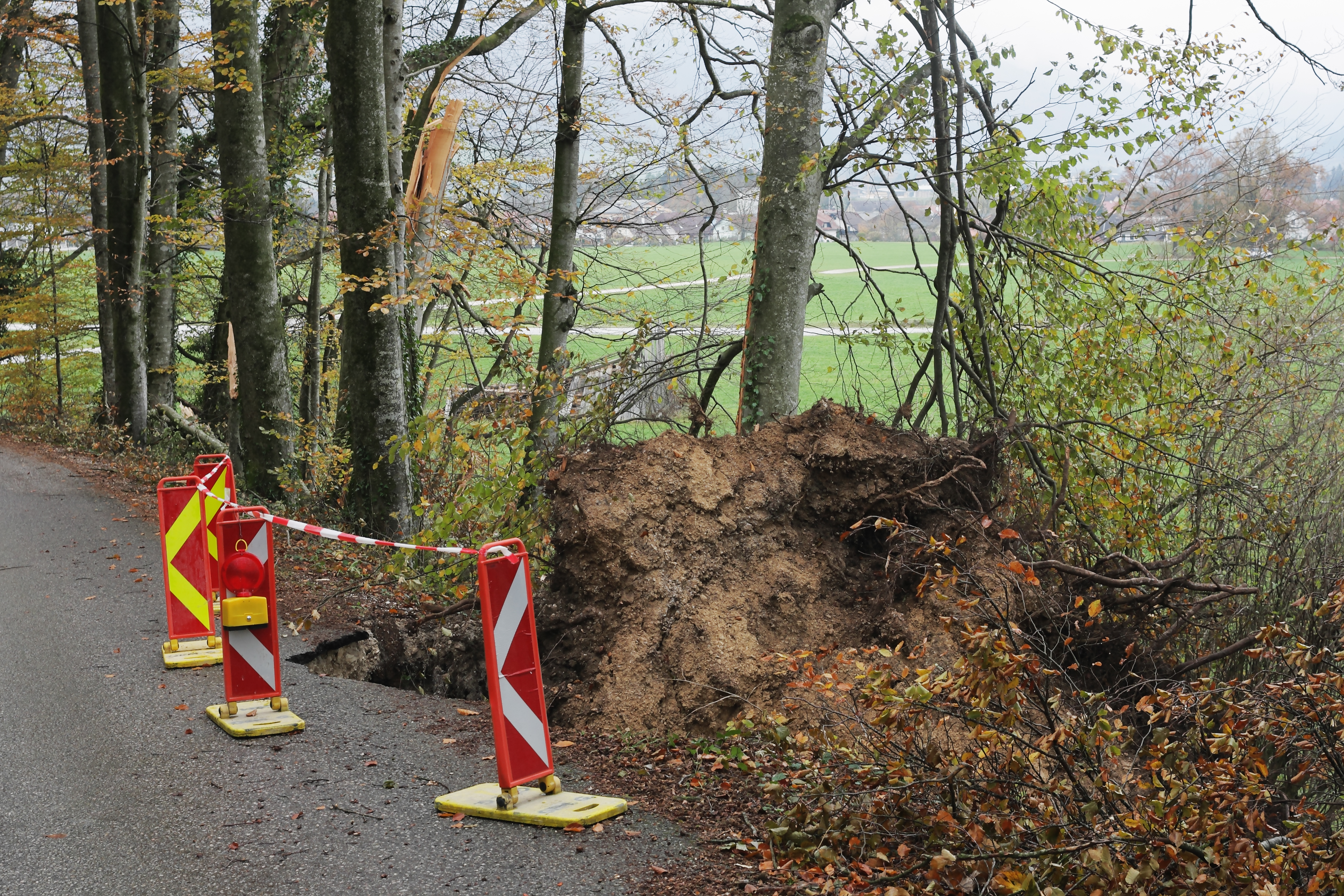 Ein entwurzelter Baum an der Riedbergstraße in Leonstein, Gemeinde Grünburg. Im Hintergrund gebrochene Bäume und ein zerstörter Heustadel